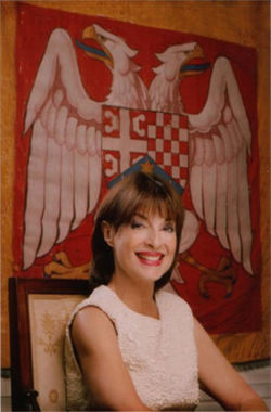 Jelisaveta Karađorđević, ook wel bekend als prinses Elisabeth van Joegoslavië.